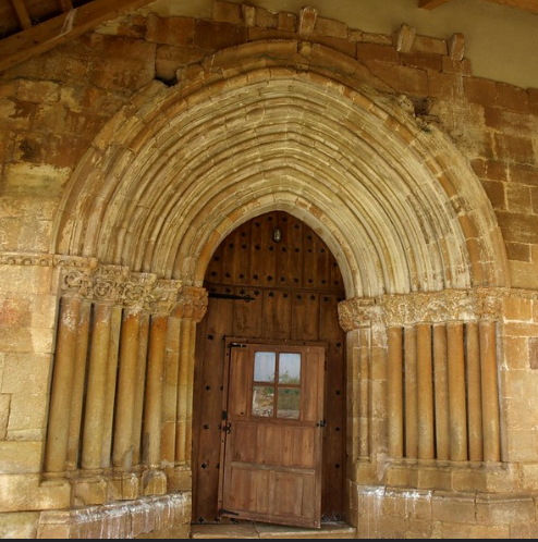 San Quirce deRío Pisuerga (Palencia), portada